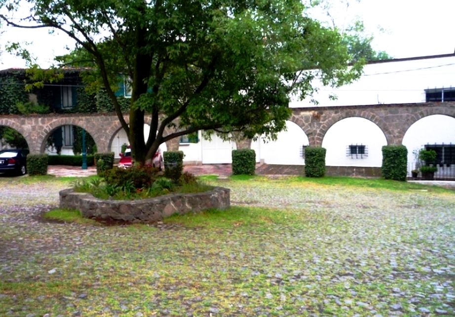 Restos del Acueducto de Santa Fe